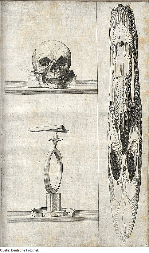 Original image description from the Deutsche Fotothek Geometrie & Perspektive & Figur